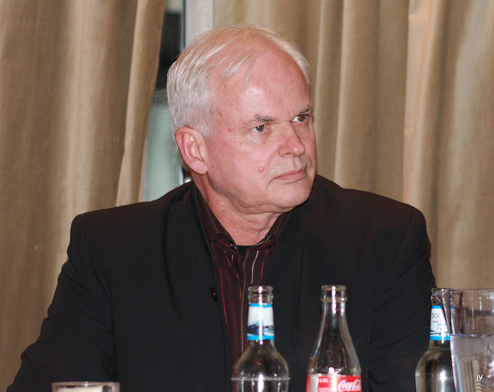 Odd Kristian Reme , at Kultkafeen in Stavanger